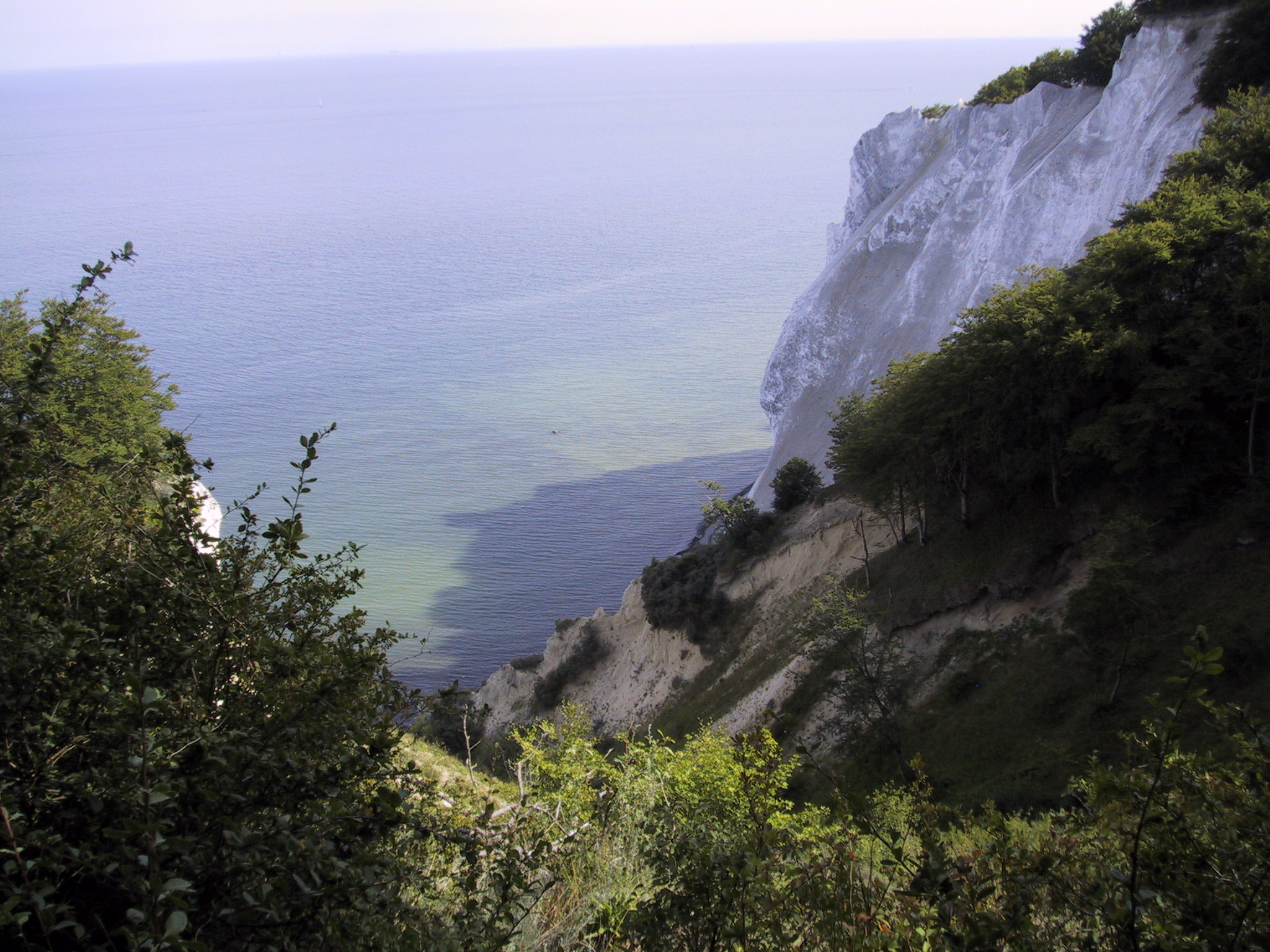 Die Kreidefelsen auf Møn